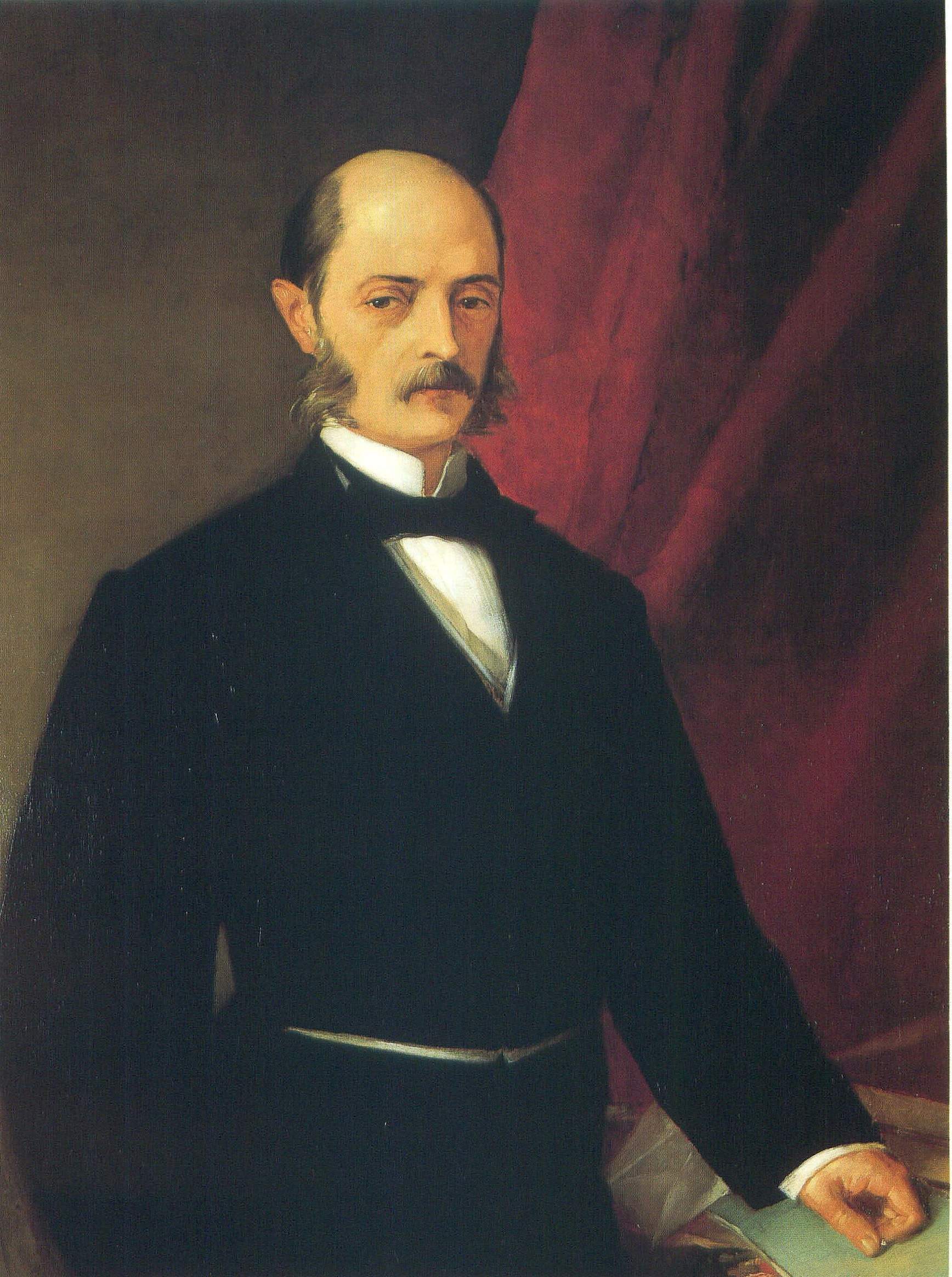 Retrato del abogado, economista y político español Laureano Figuerola Ballester (1816-1903), que llegó a ser ministro de Hacienda durante el Gobierno Provisional de 1868-1871 y también presidente del Senado de España.